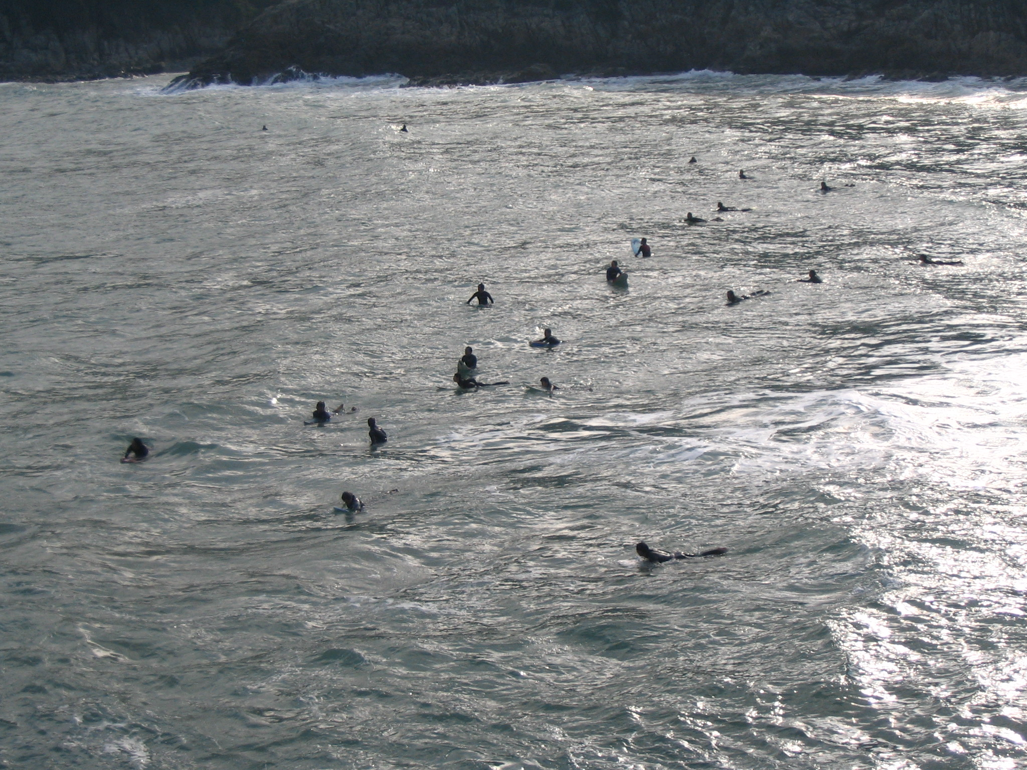 Photo of Big Wave Bay, Hong Kong Island